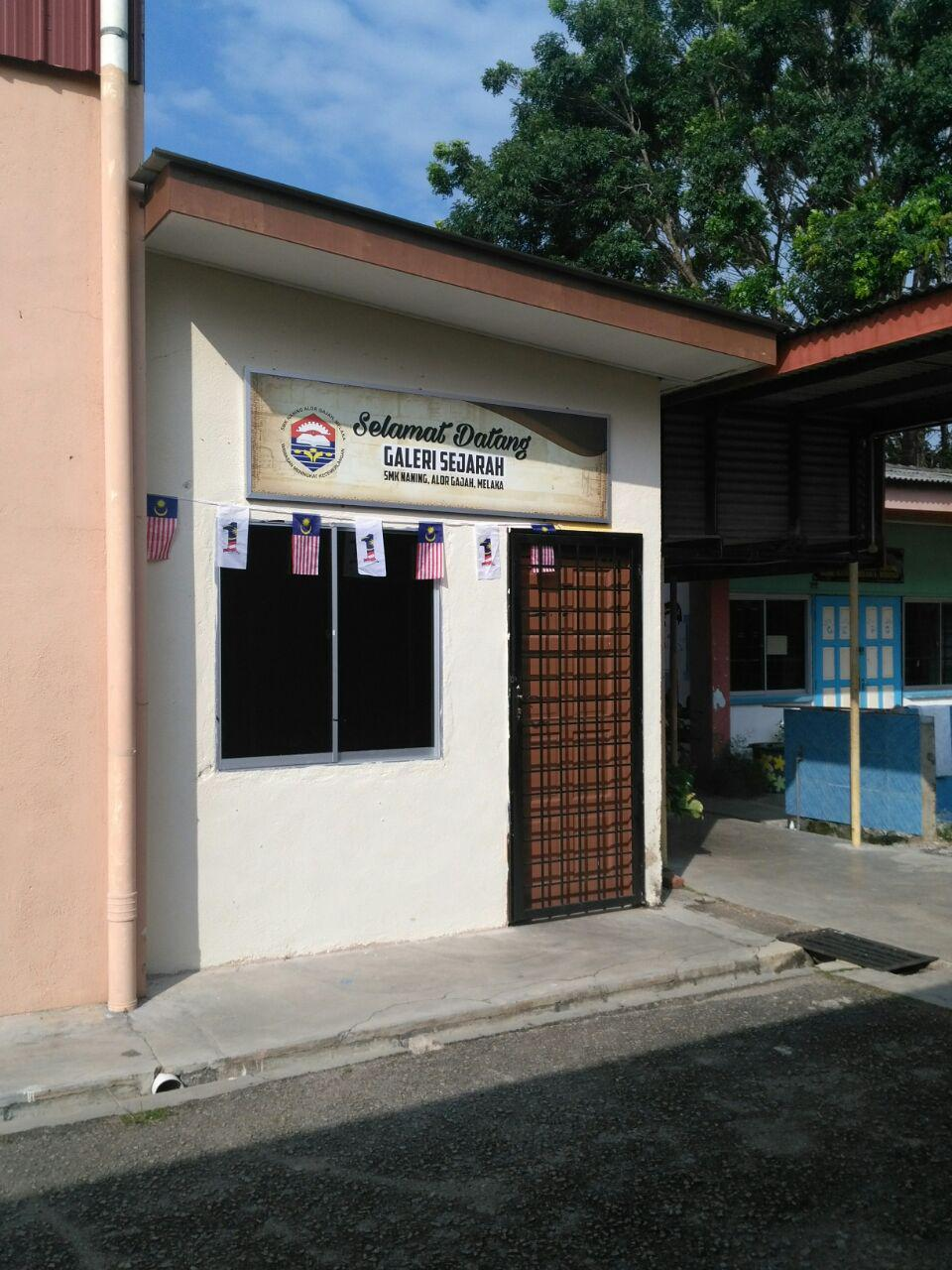 Galeri ini ditubuhkan pada 2017